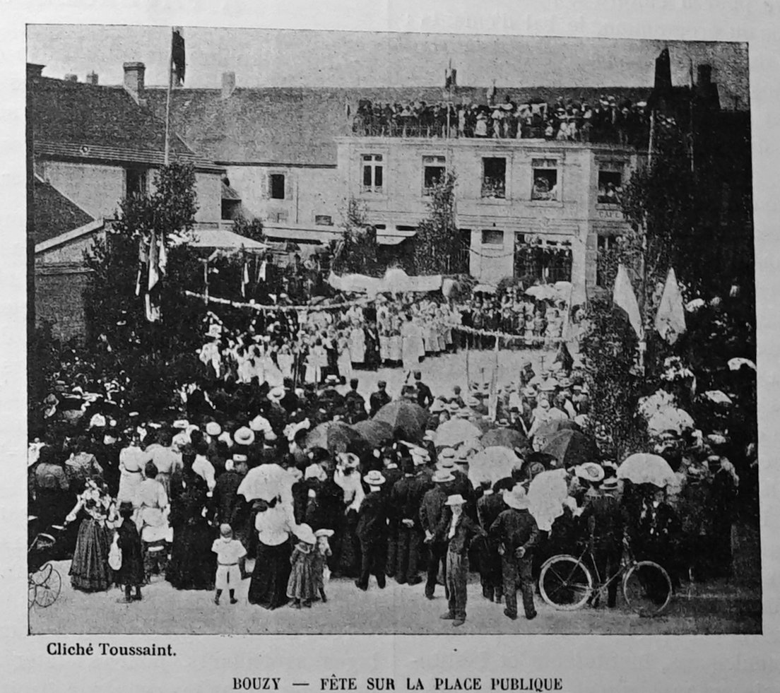 publié dans le "Bulletin de l'œuvre des voyages scolaires".